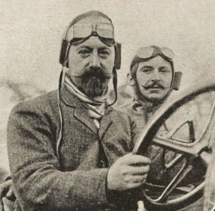 Lucien Hautvast, deuxième du Kaiserpreis 1907, La Vie au Grand Air, 22 juin 1907, p. 425